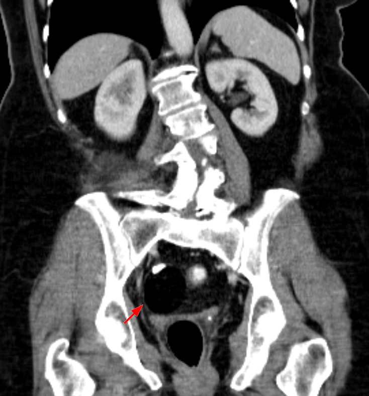 Teratom des Ovars in der Computertomographie: Glatt begrenzte, fetthaltige Formation, die einen sehr dichte Anteil (Zahnanlage!?) zeigt.